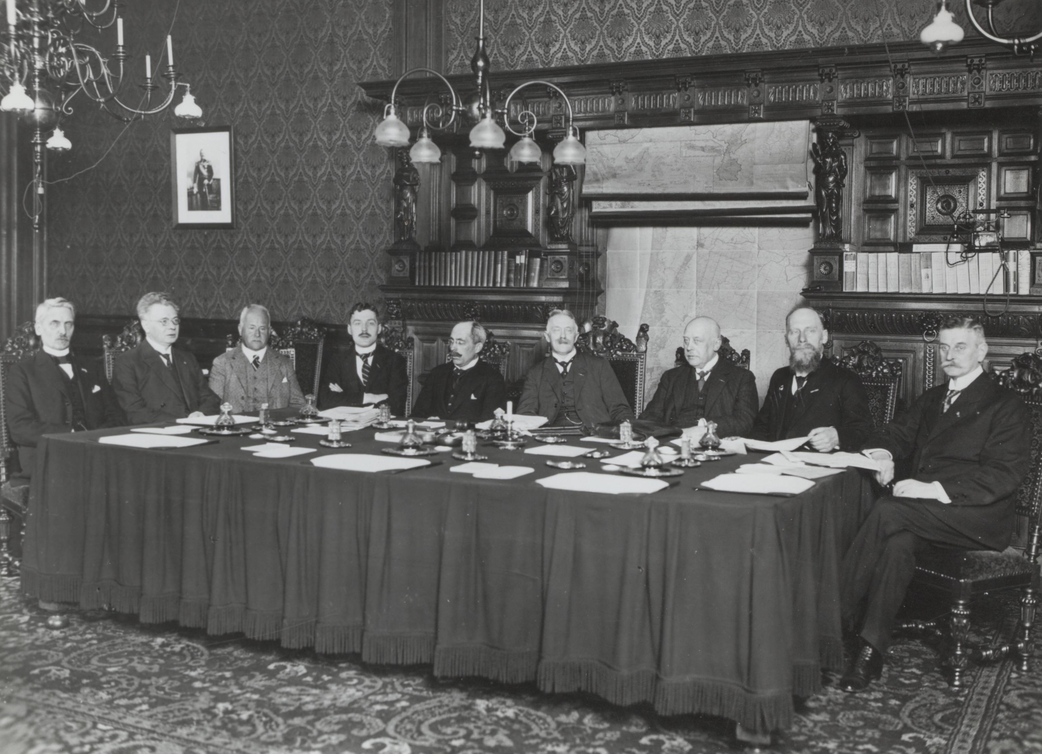 Eerste kabinet De Geer (1926-1929) achter de vergadertafel. Plaats en jaartal onbekend.